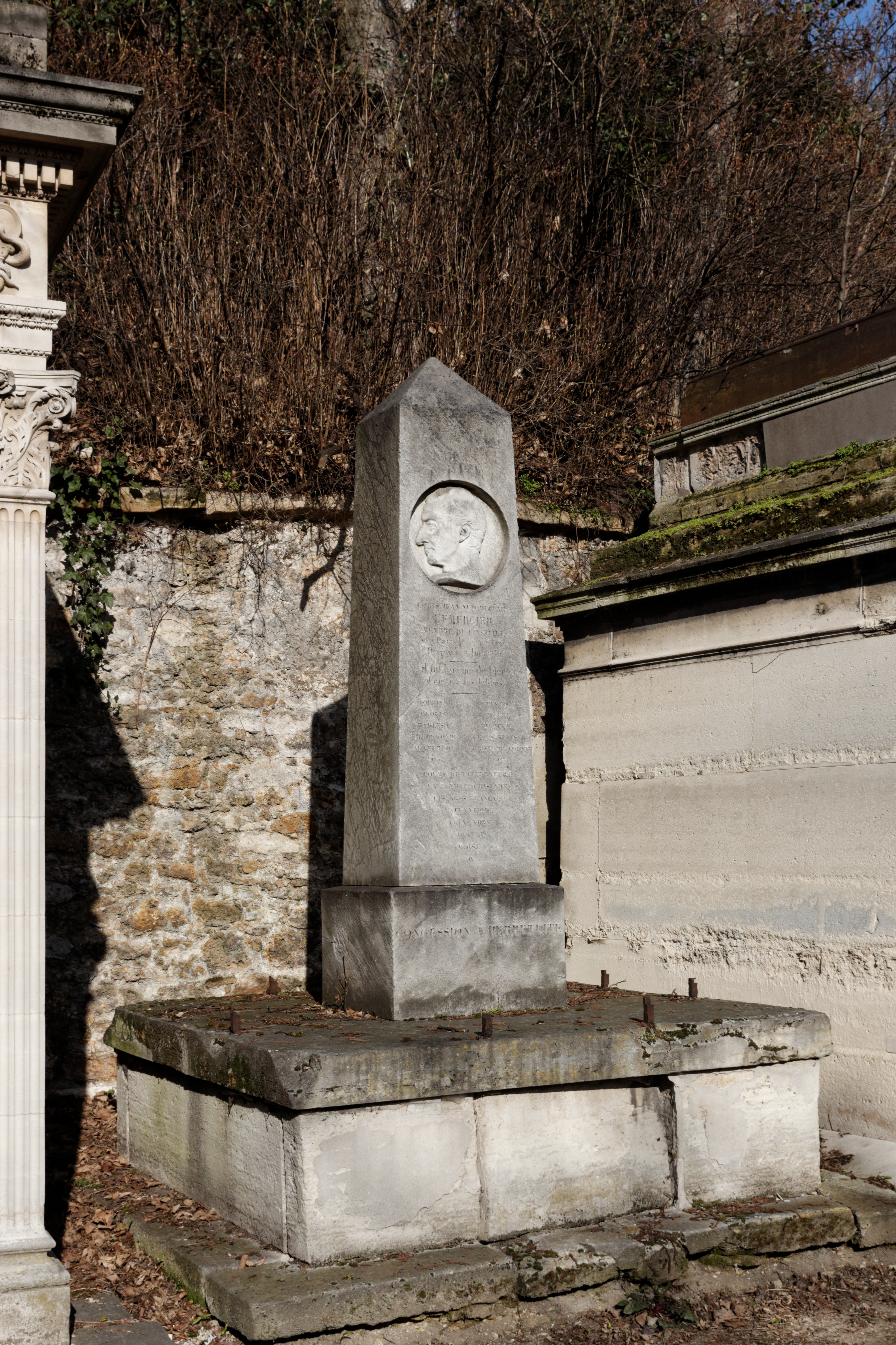 Obélisque ornée d'un médaillon en marbre blanc signé P.-J. David d'Angers, 1840.